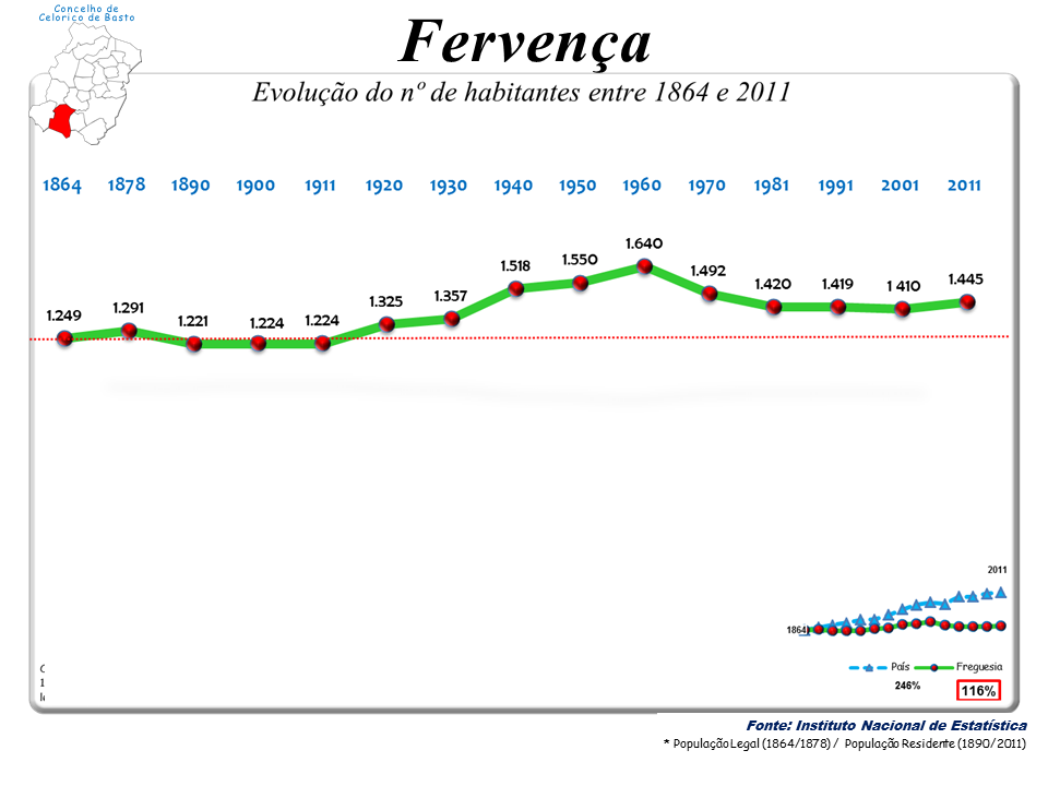 Censos 1864/2011